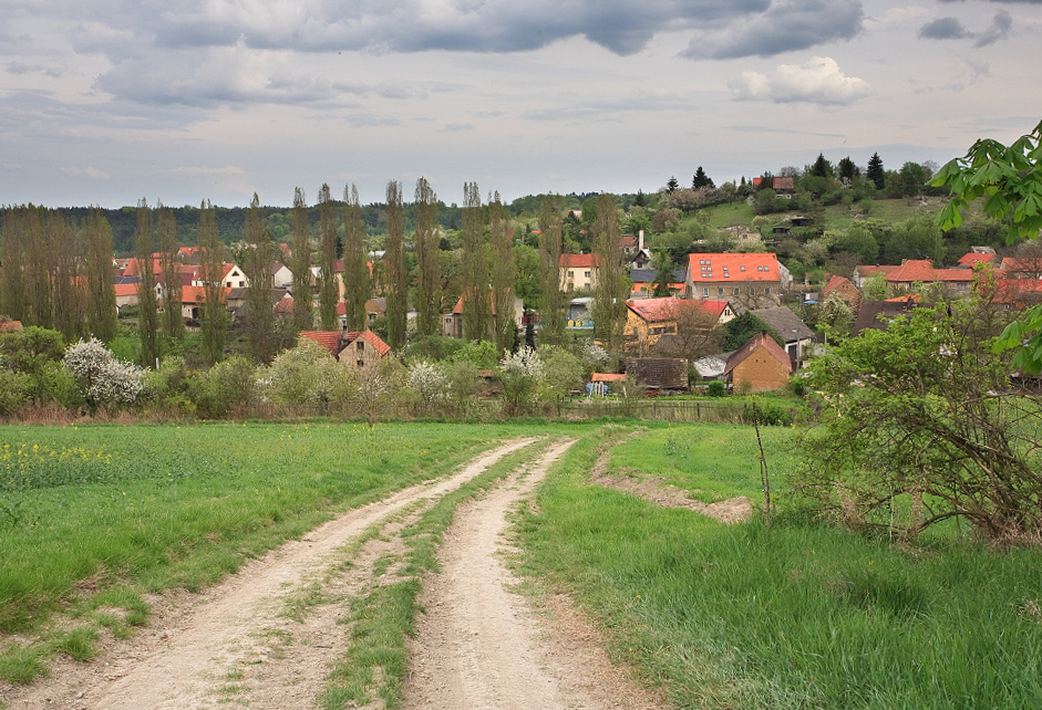 pohled na vesnici